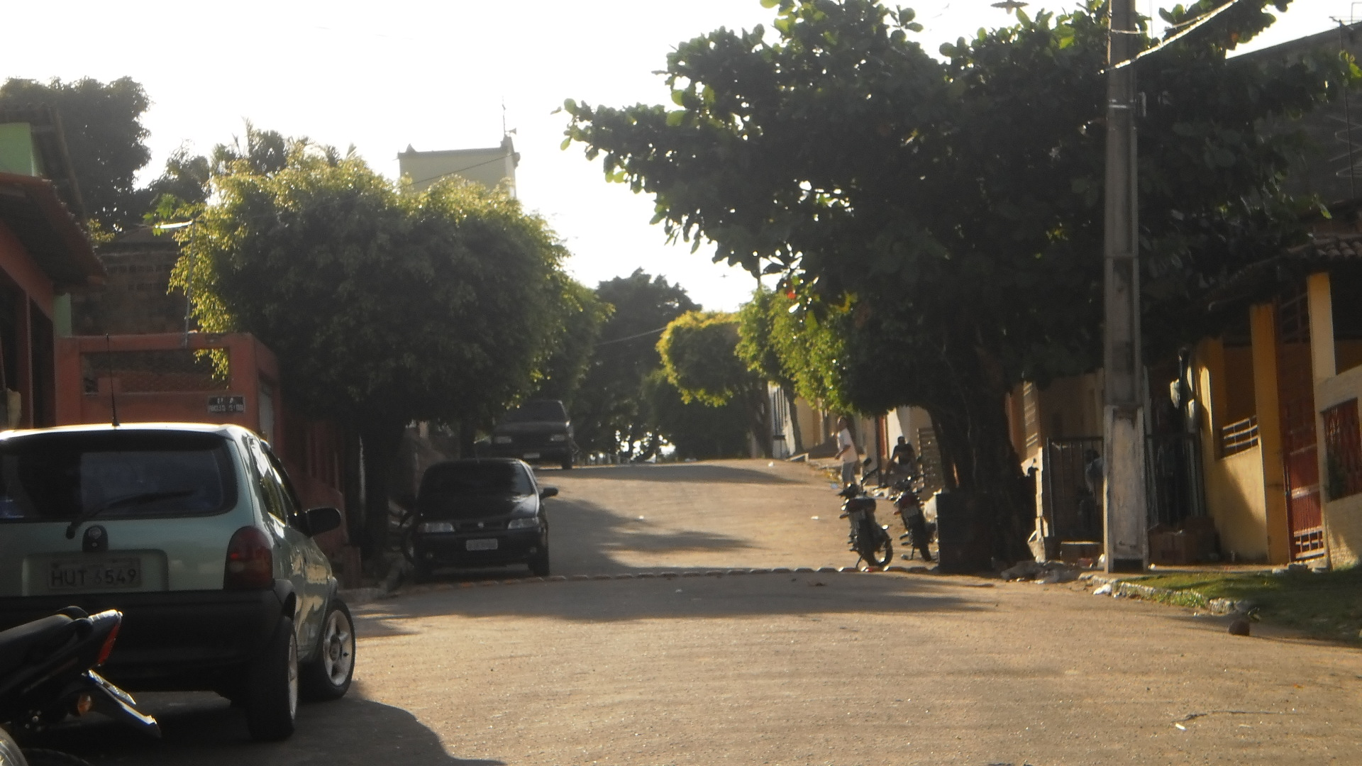 Rua principal do distrito de Caldas Barbalha - Ce